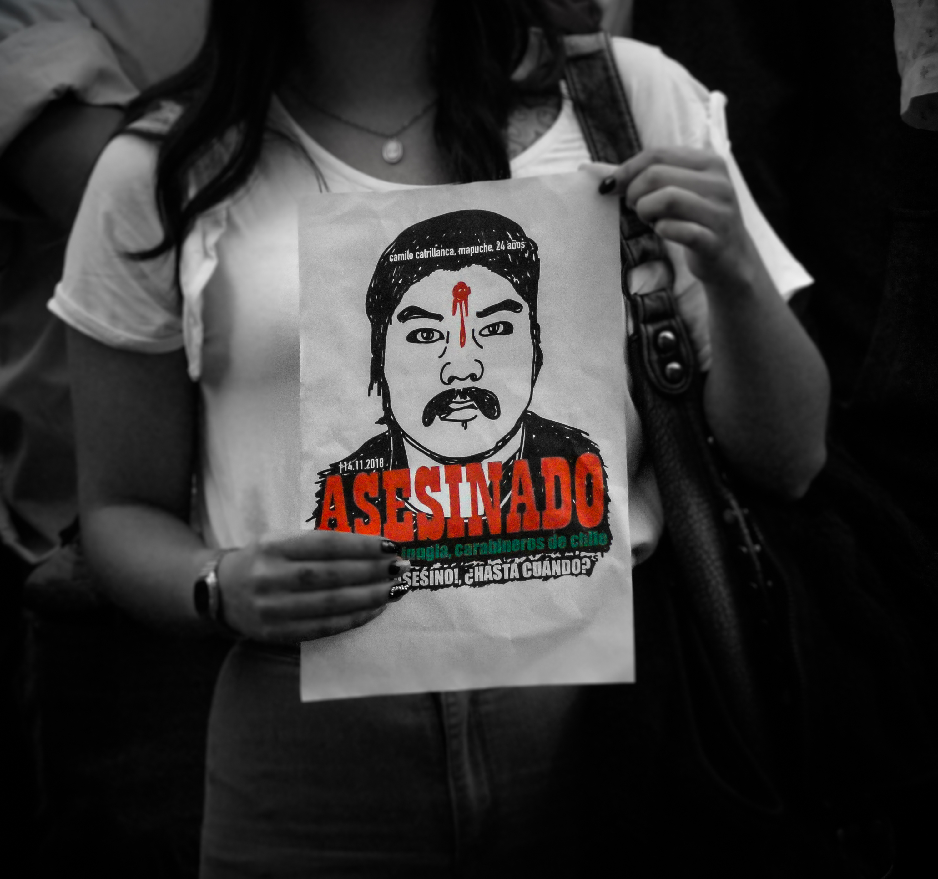 Afiche de Camilo Catrillanca en una manifestacion en la ciudad de Antofagasta, Chile